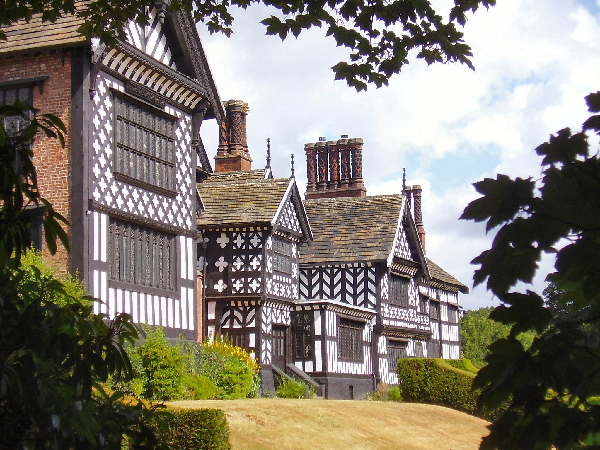 C Hoyle